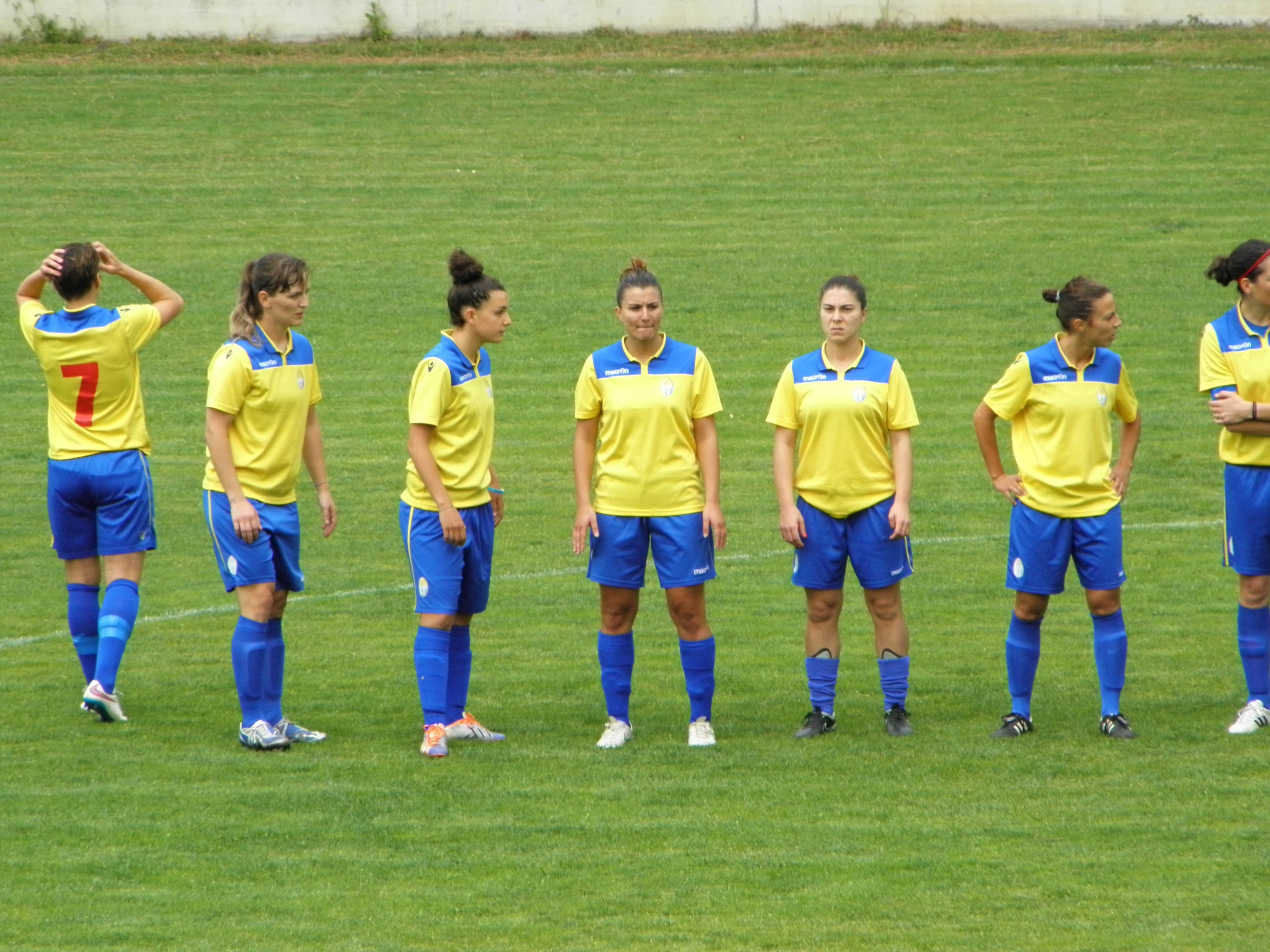 Milano Marittima, Cervia: Stadio Stadio Germano Todoli, partita di play-off di Serie A di calcio femminile 2014-2015, Riviera di Romagna contro San Zaccaria.